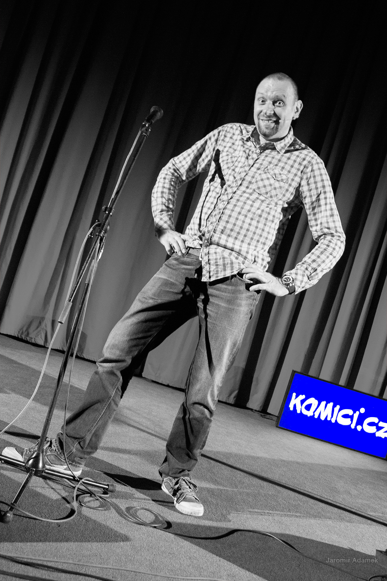 25. 2. 2013 vystoupení Miloše Knora v třineckém kině Kosmos. Foto Jaromír Adámek 2013 (